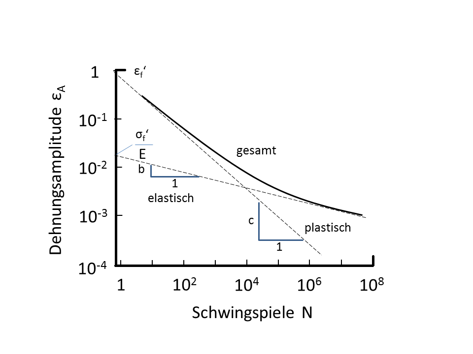 Dehnungs-Wöhlerlinie mit Bezeichnungen